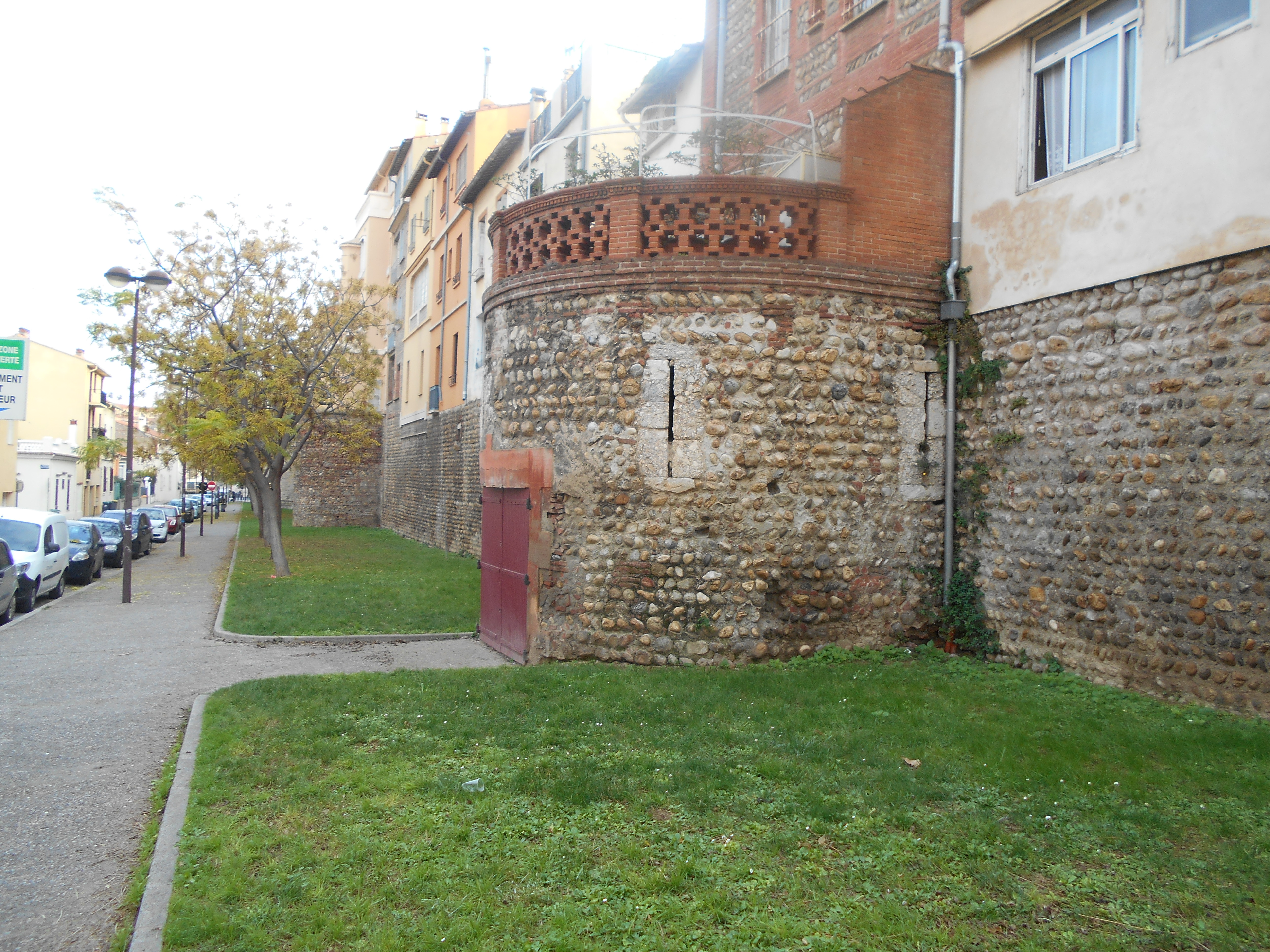 Muralla de Perpinyà de vers el 1300